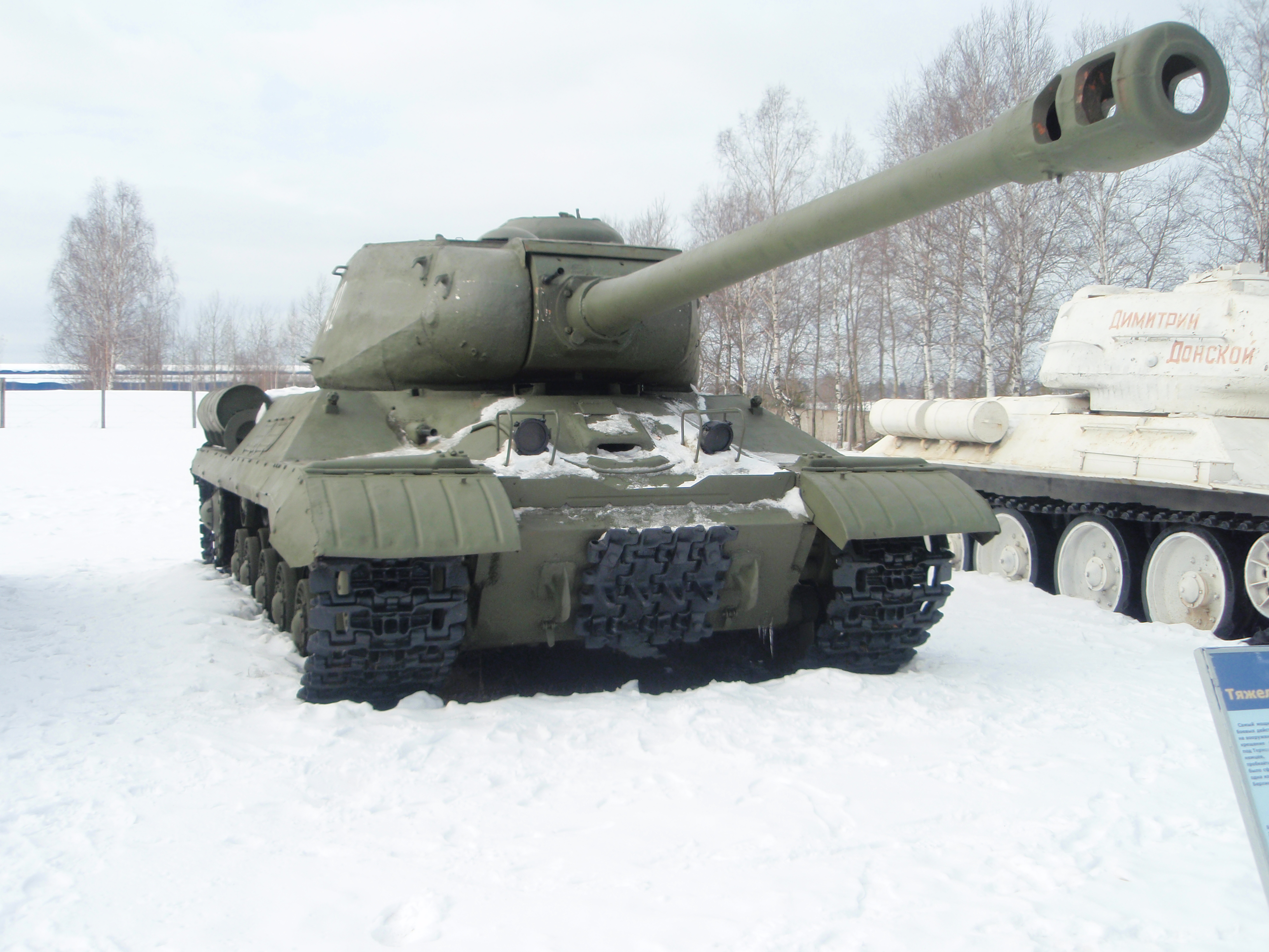 Советский тяжёлый танк ИС-2 в Кубинке